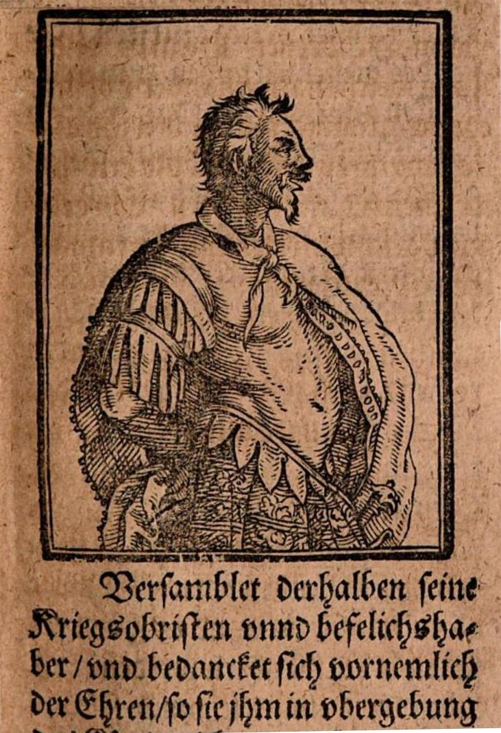 Attila ábrázolása Wilhelm_Dilich Ungarische_Chronica című művében